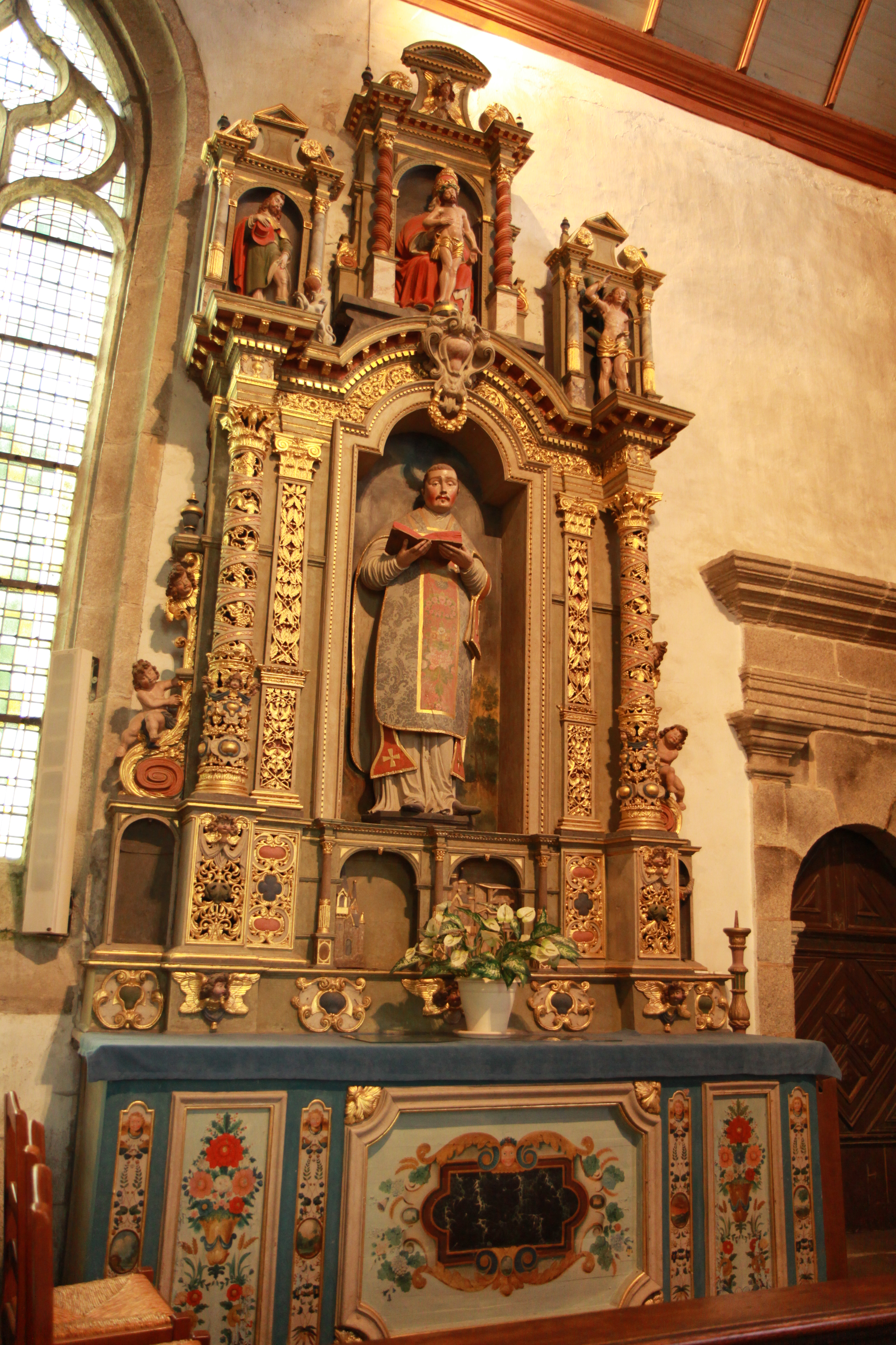 Vue de l'enclos paroissial de Lampaul-Guimiliau.